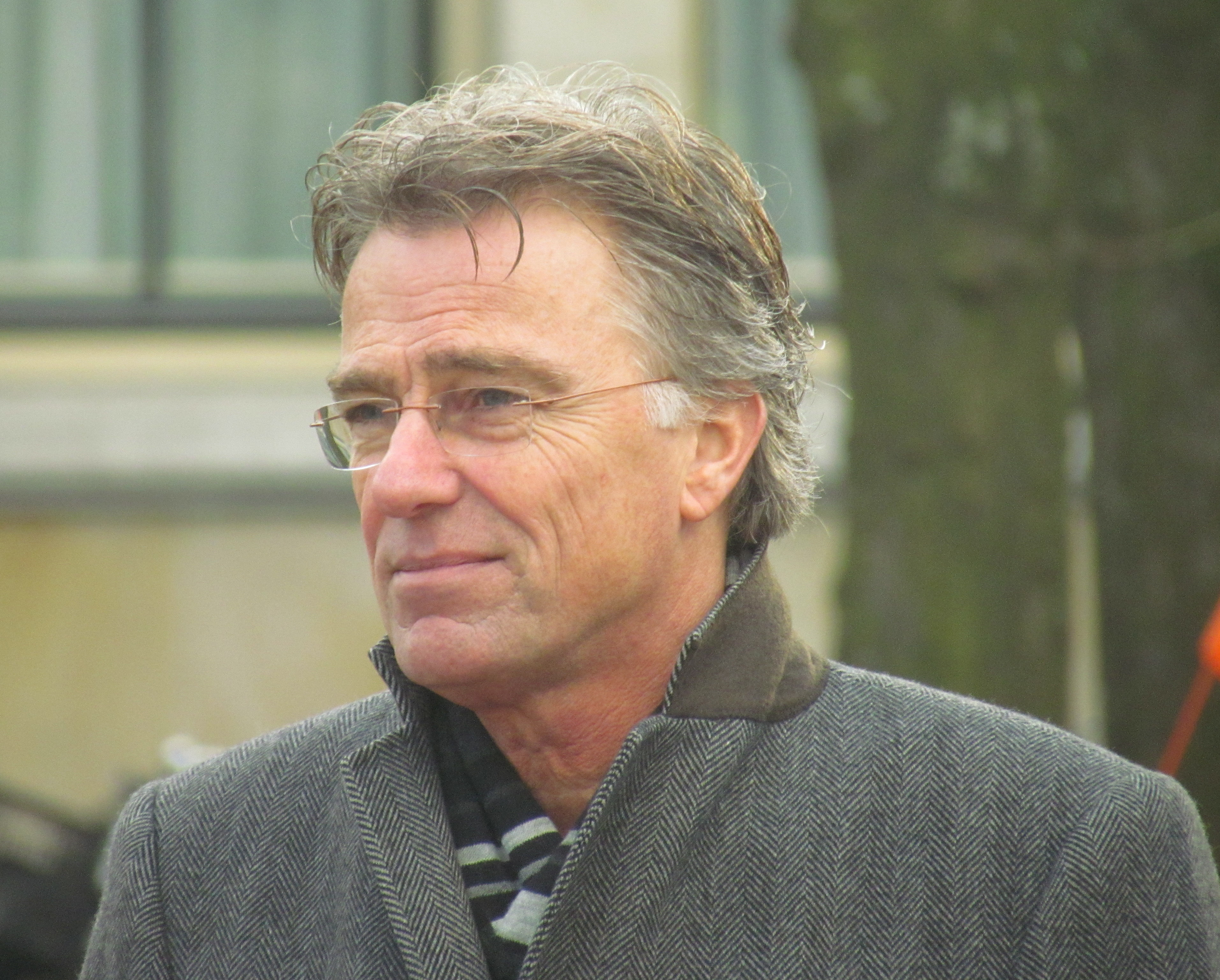 Rob Trip, Nederlands journalist en (nieuws)presentator